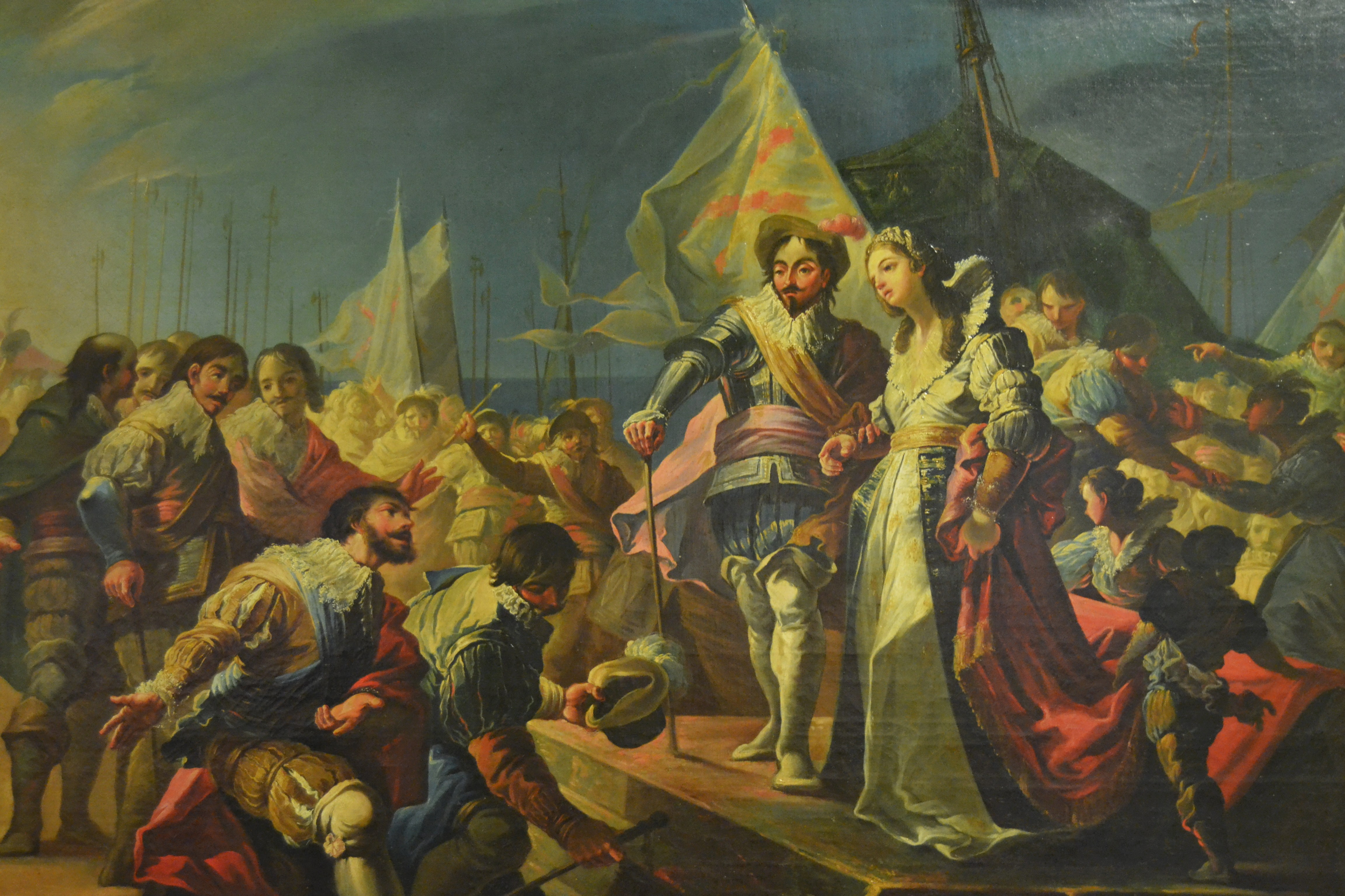 Catalan: Desembarcament a València de Ferran el Catòlic i Germana de Foix